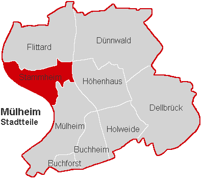 Lagekarte Stammheim im Stadtbezirk Köln-Mülheim